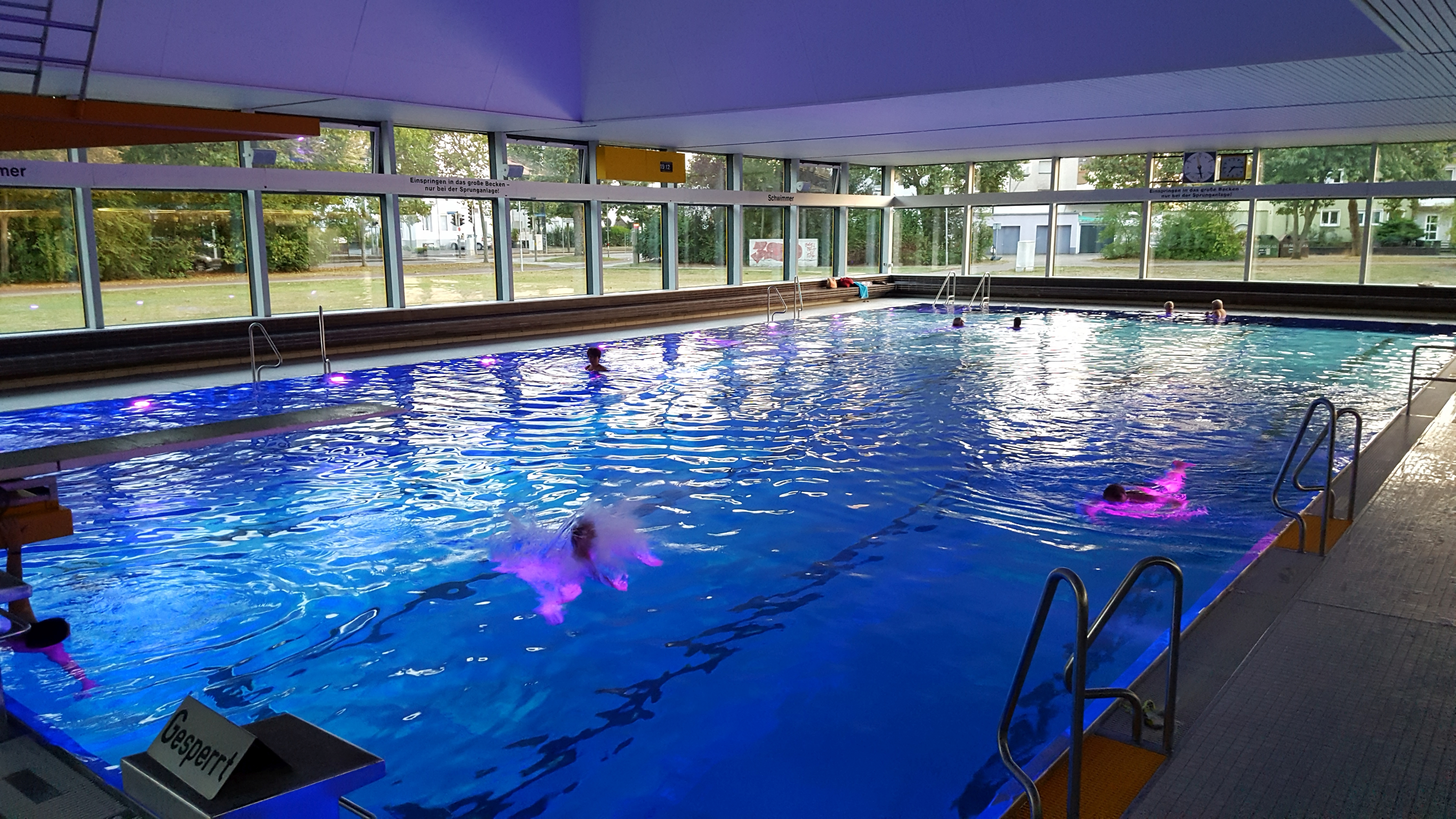 Hallenbad Forchheim - Wiedereröffnung nach Sanierung